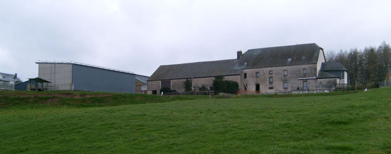 De Scheierhaff bei Veianen vun Südwesten aus fotograféiert